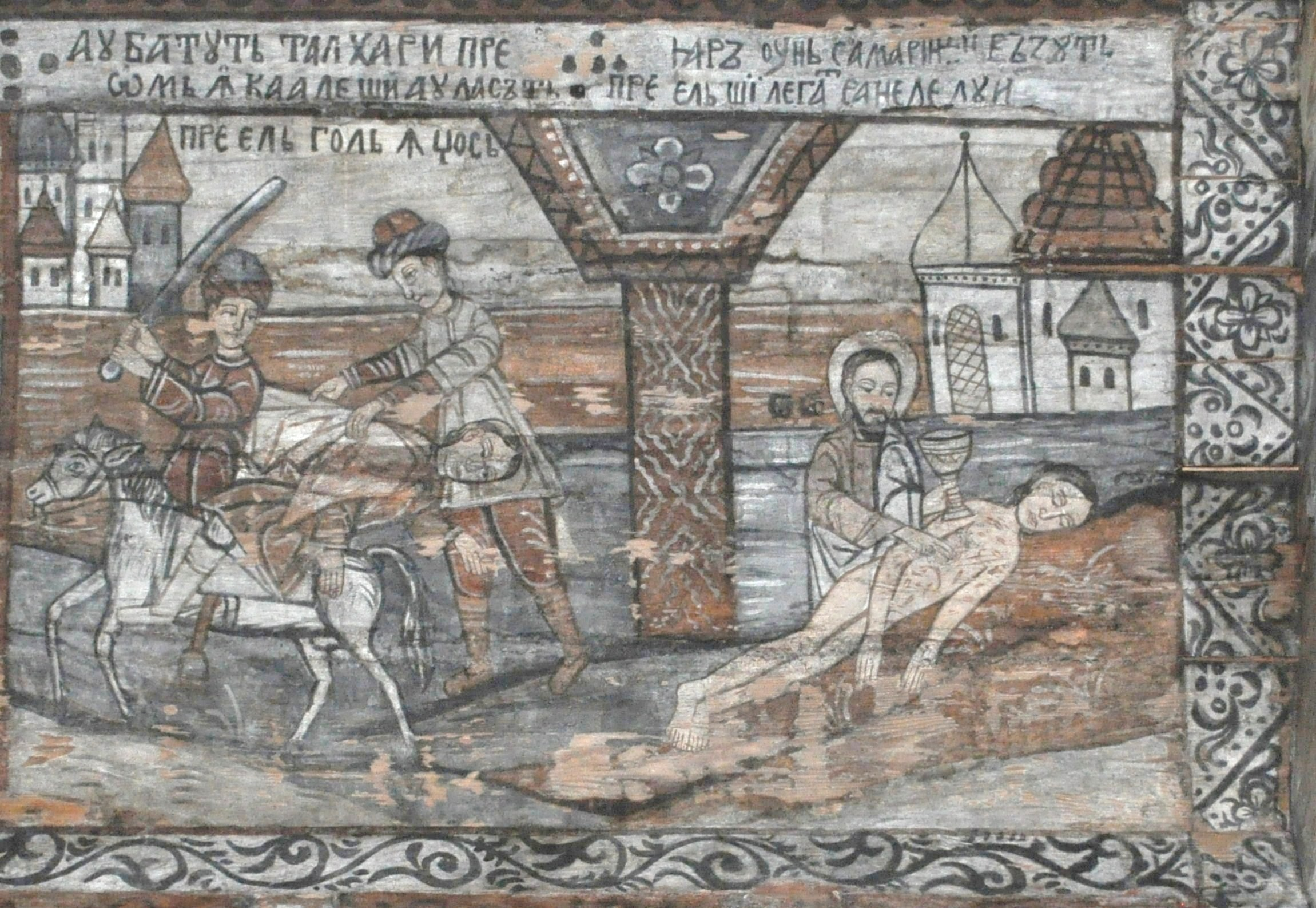 Biserica de lemn "Naşterea Maicii Domnului", sat IEUD